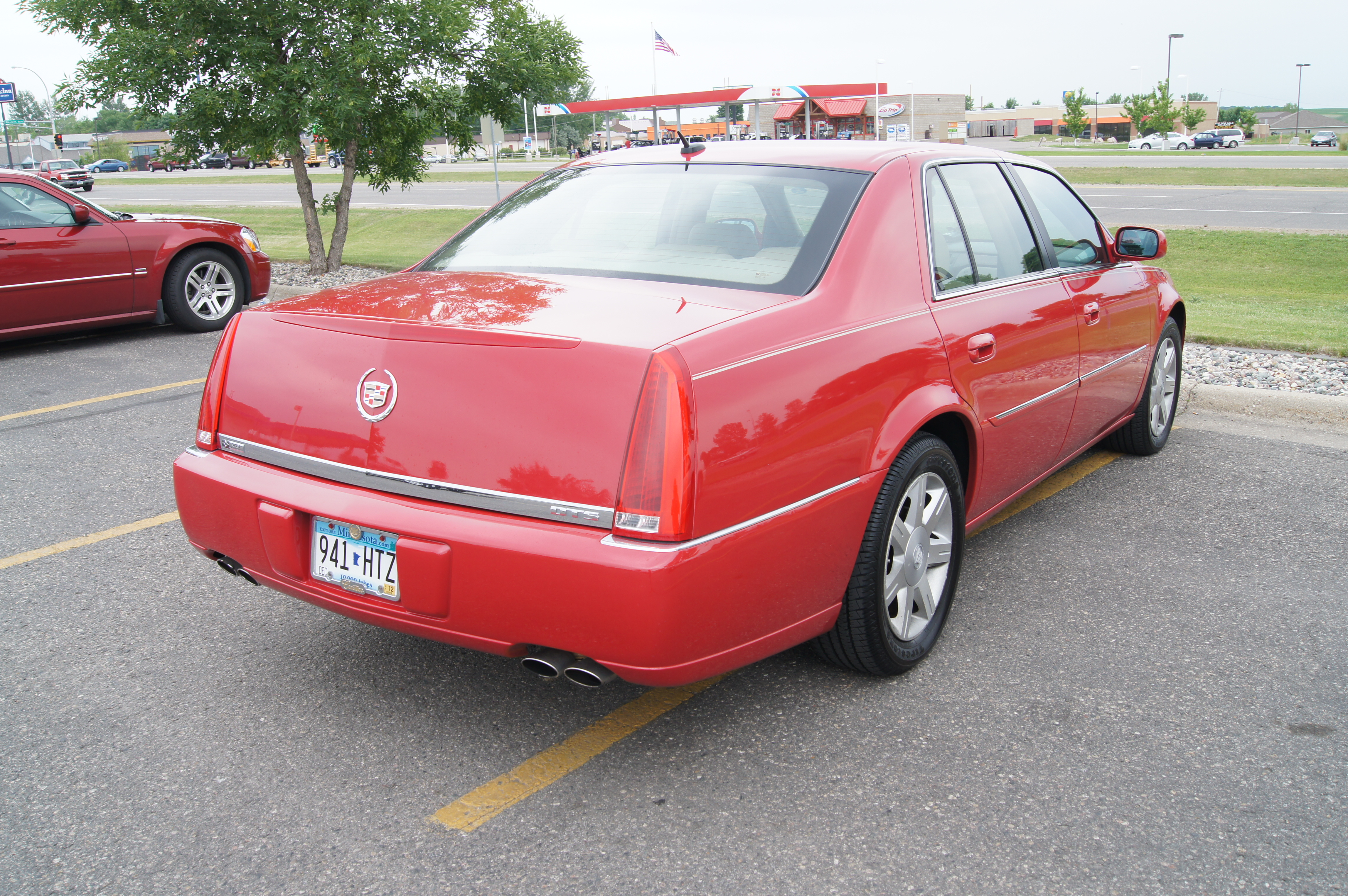 06 Cadillac DTS